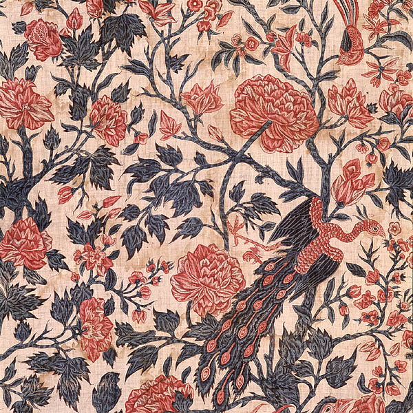 Een deel van een palempore. In het middenveld zijn grote vogels op takken en kleine bloemen en bladeren. De rand bestaat uit grote bloemen. Het ontwerp vertoont Chinese invloed (citaat cat. Sits 1987). Naturel fond, middenveld: takken, vogels en bloemen in rood en blauw, rand: blauwe takken en rode bloemen.